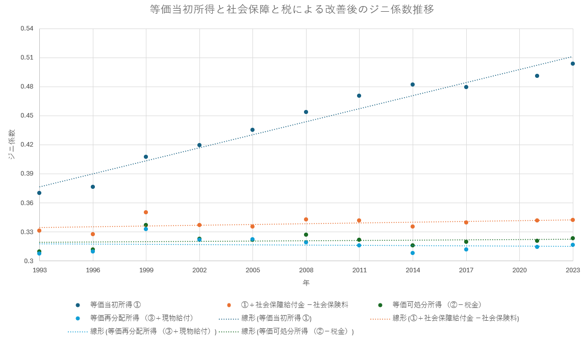 1993年以降の再分配前の等価当初所得と社会保障と税による改善後のジニ係数推移